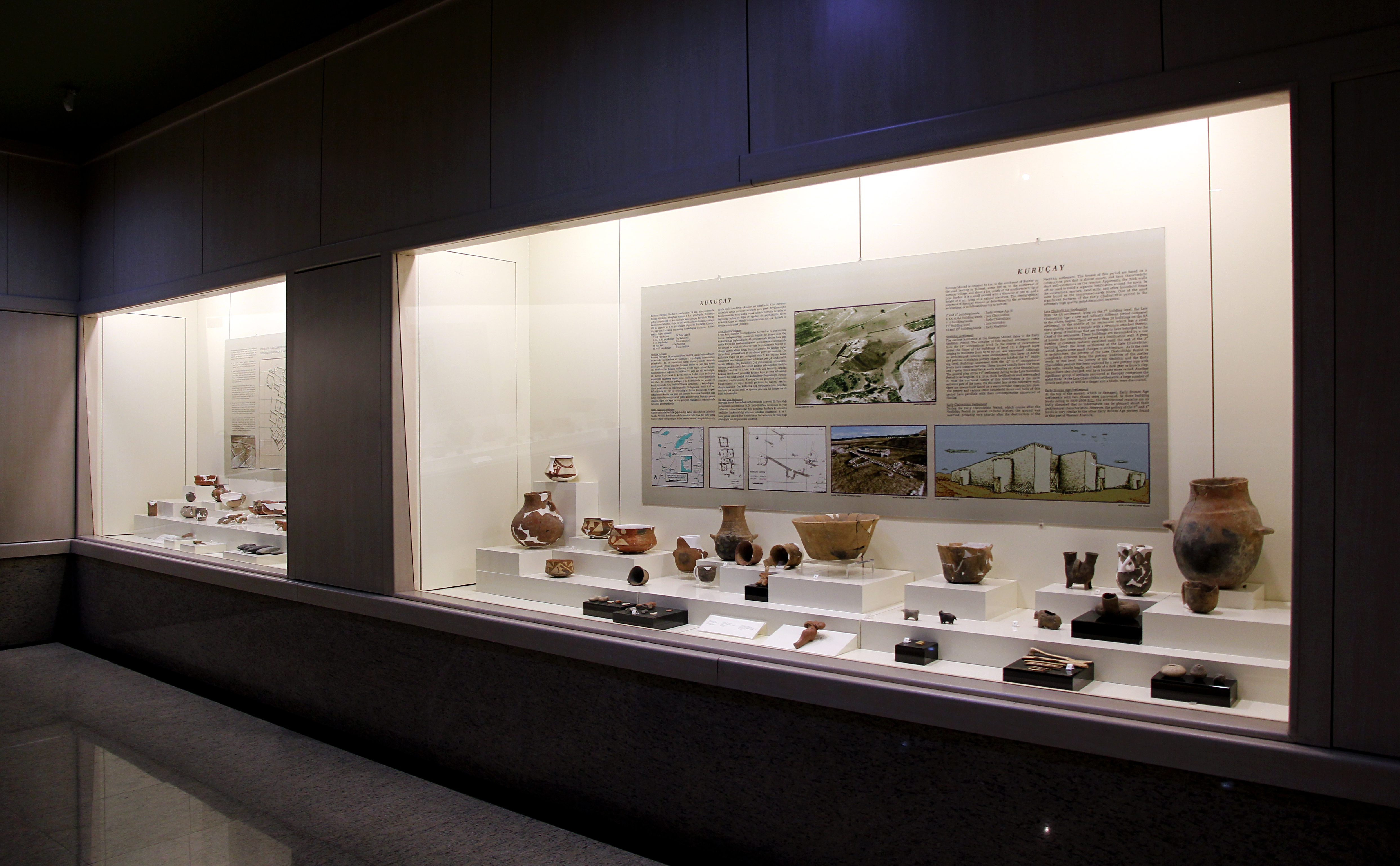 Archäologisches Museum Burdur, Südwesttürkei, Funde aus Kuruçay